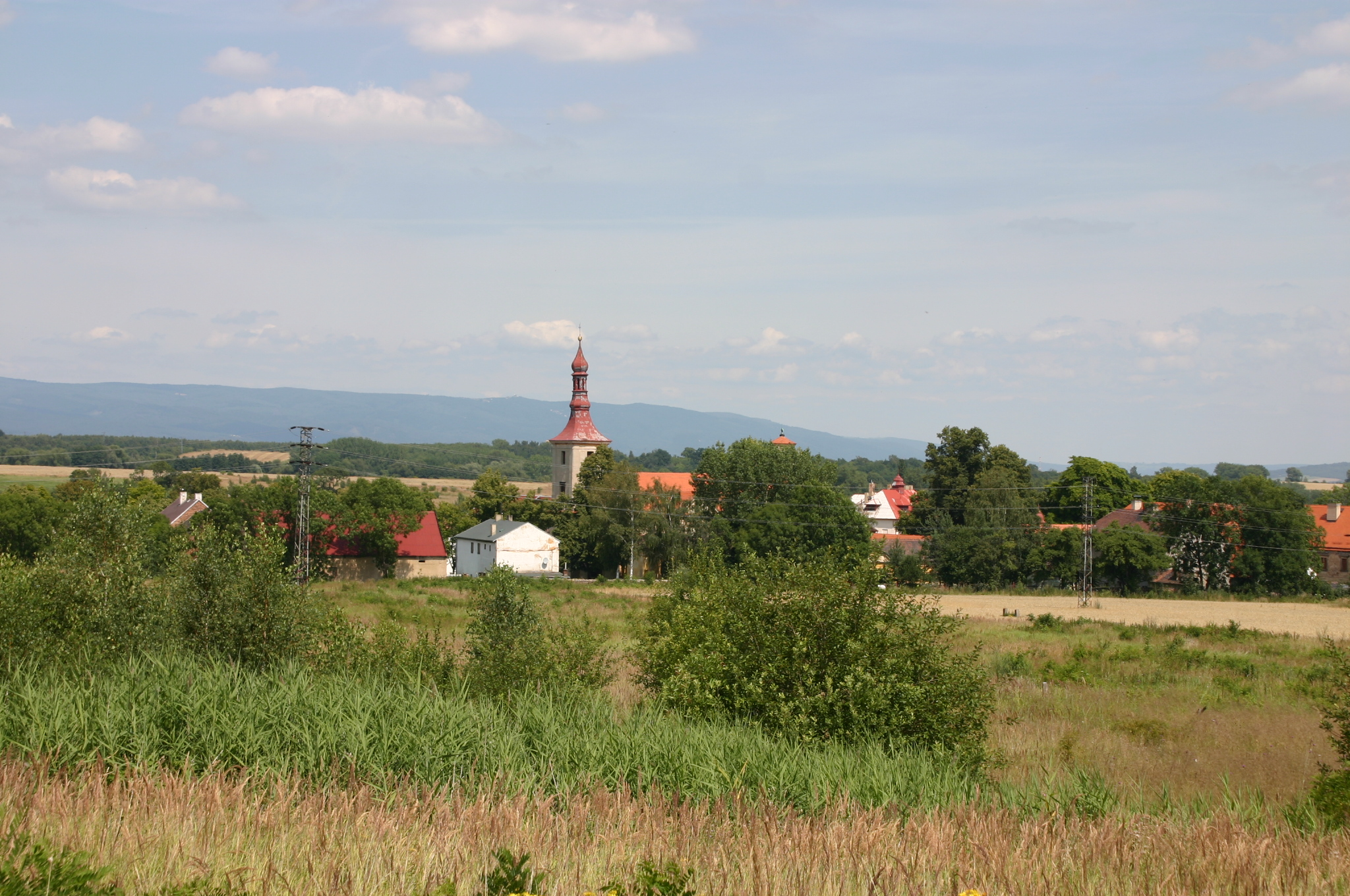 Obec Mariánské Radčice v okrese Most.